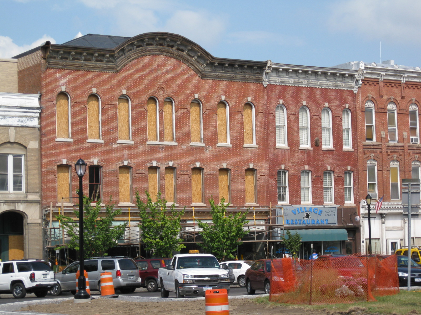 Halls Opera Block Aug 09